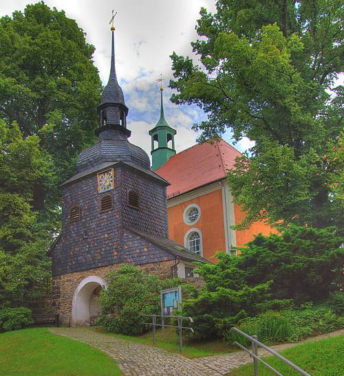 Frei stehender Glockenturm und Kirche in Lawalde